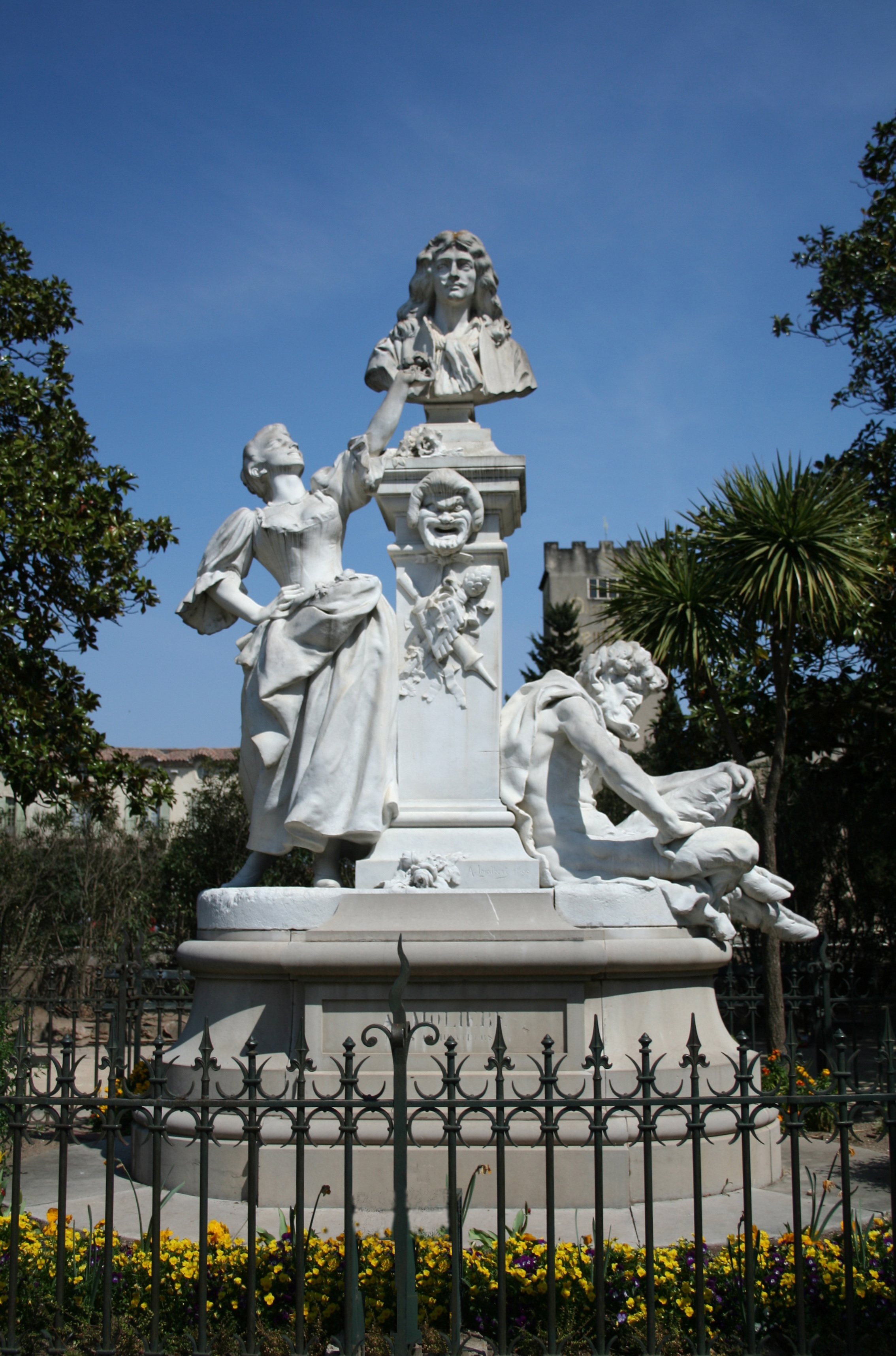 Pézenas (Hérault) - Monument à Molière - Sculpture d'Injalbert.